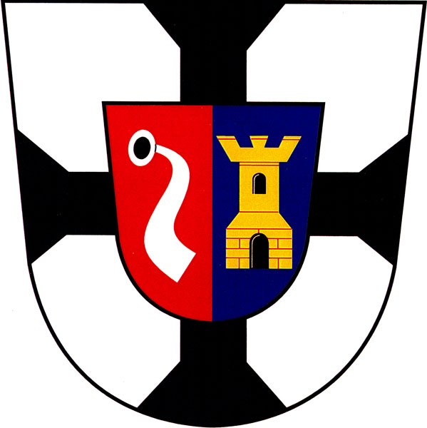 Znak obce Mělnické Vtelno